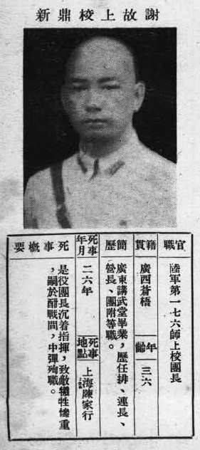 抗戰軍人忠烈錄第一輯中的烈士遺像